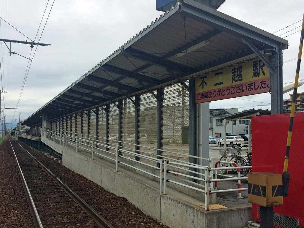 富山地方鉄道不二越線 不二越駅